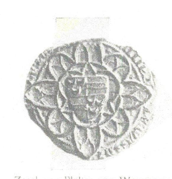 Zegel met wapen Philips van Wassenaer Burggraaf van Leiden 1341